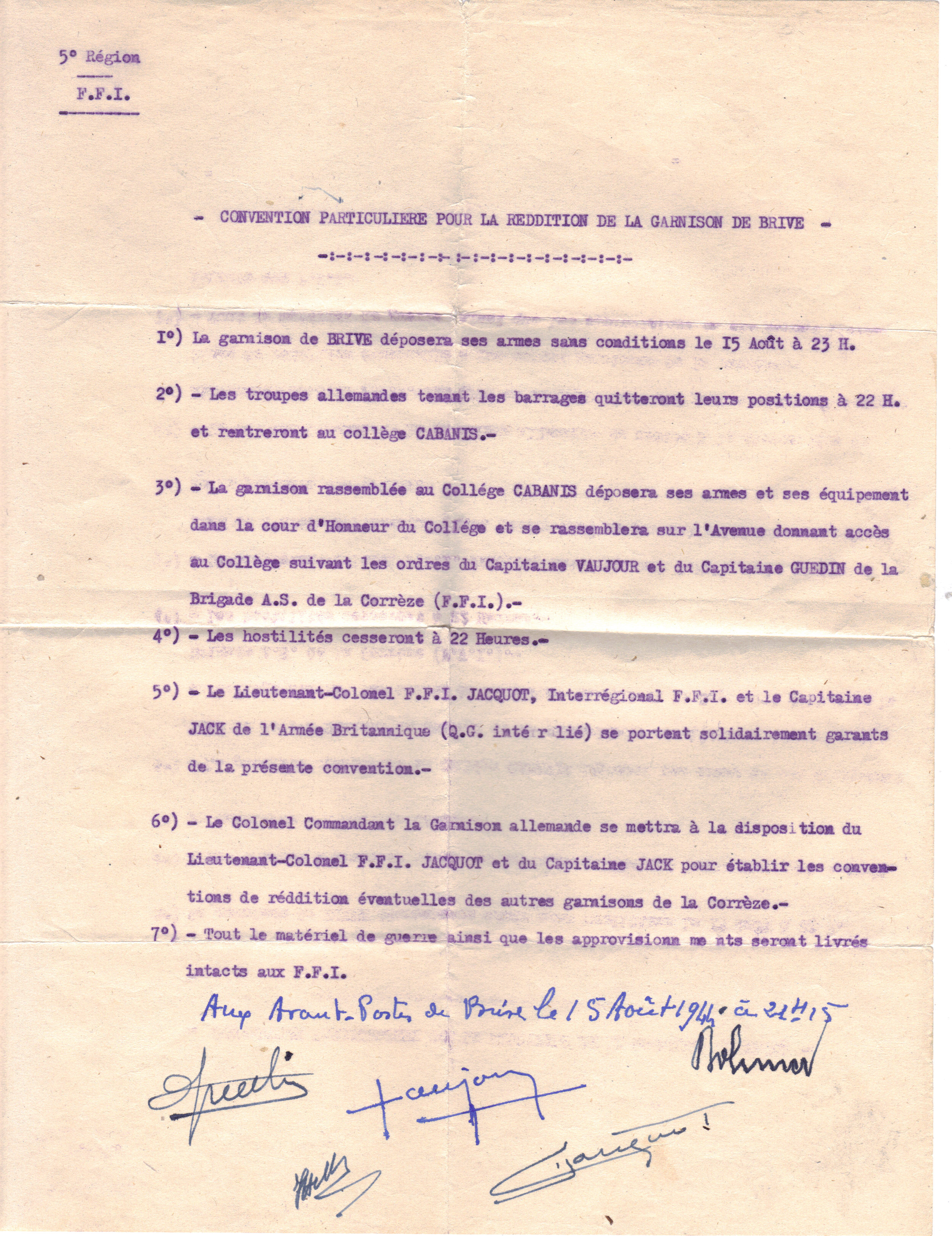 Original de la convention particulière pour la reddition de la garnison de Brive signée le 15 aôut 1944 par le lieutenant colonel FFI Jacquot, Jacques POIRIER alias Capitaine Jack du S.O.E, les capitaines VAUJOUR et GUEDIN, et le colonel Allemand BOHMER